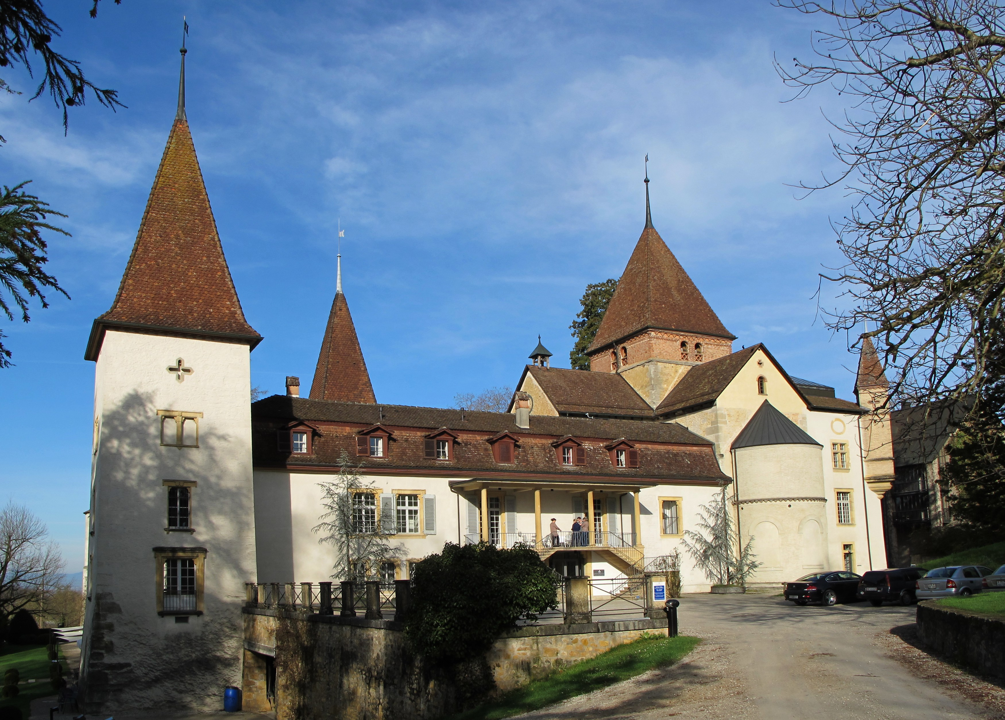 ch-info.chnähe Murtensee, Fotos anlässlich eines Anlasses der sich mit den Fragen Openaccsess und Opensôurce ind erSchweiz, Bildung in den nächsten Jahren befasste! Infos ch-info.ch